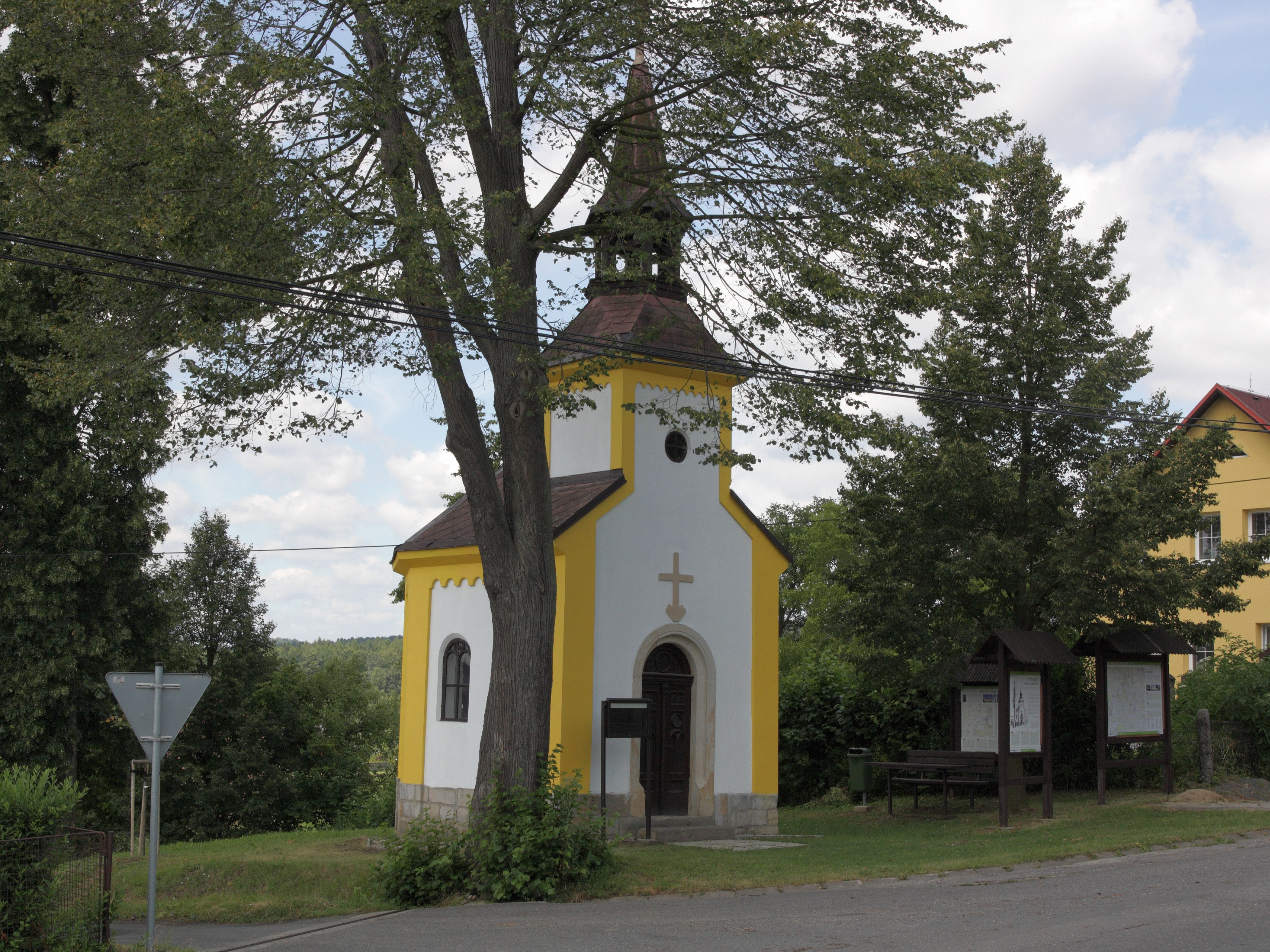 Doubí - kaple sv. Anděla strážce z roku 1874.